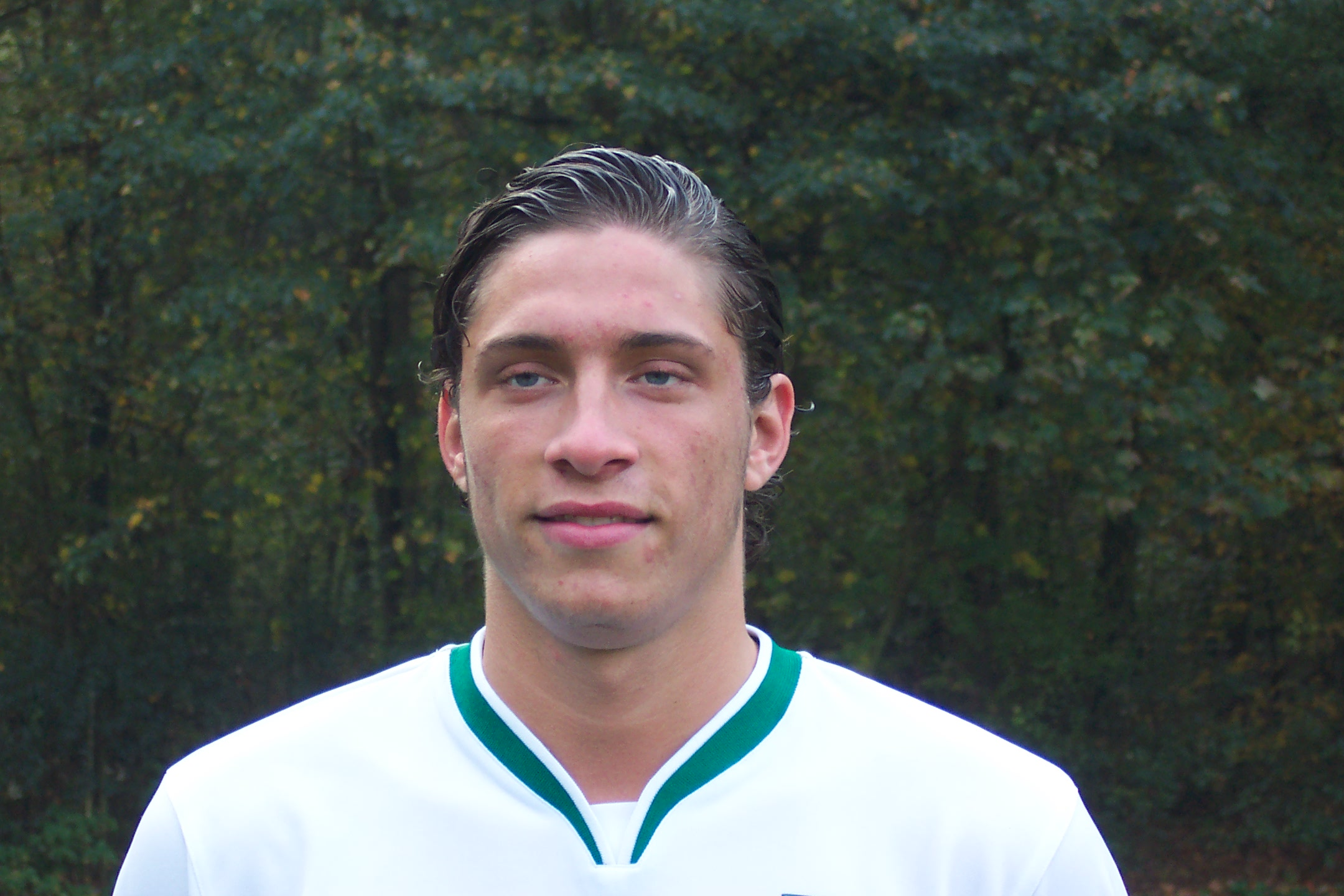 Tim Kister (2006)als Spieler der Spvgg. 05 Frankfurt-Oberrad